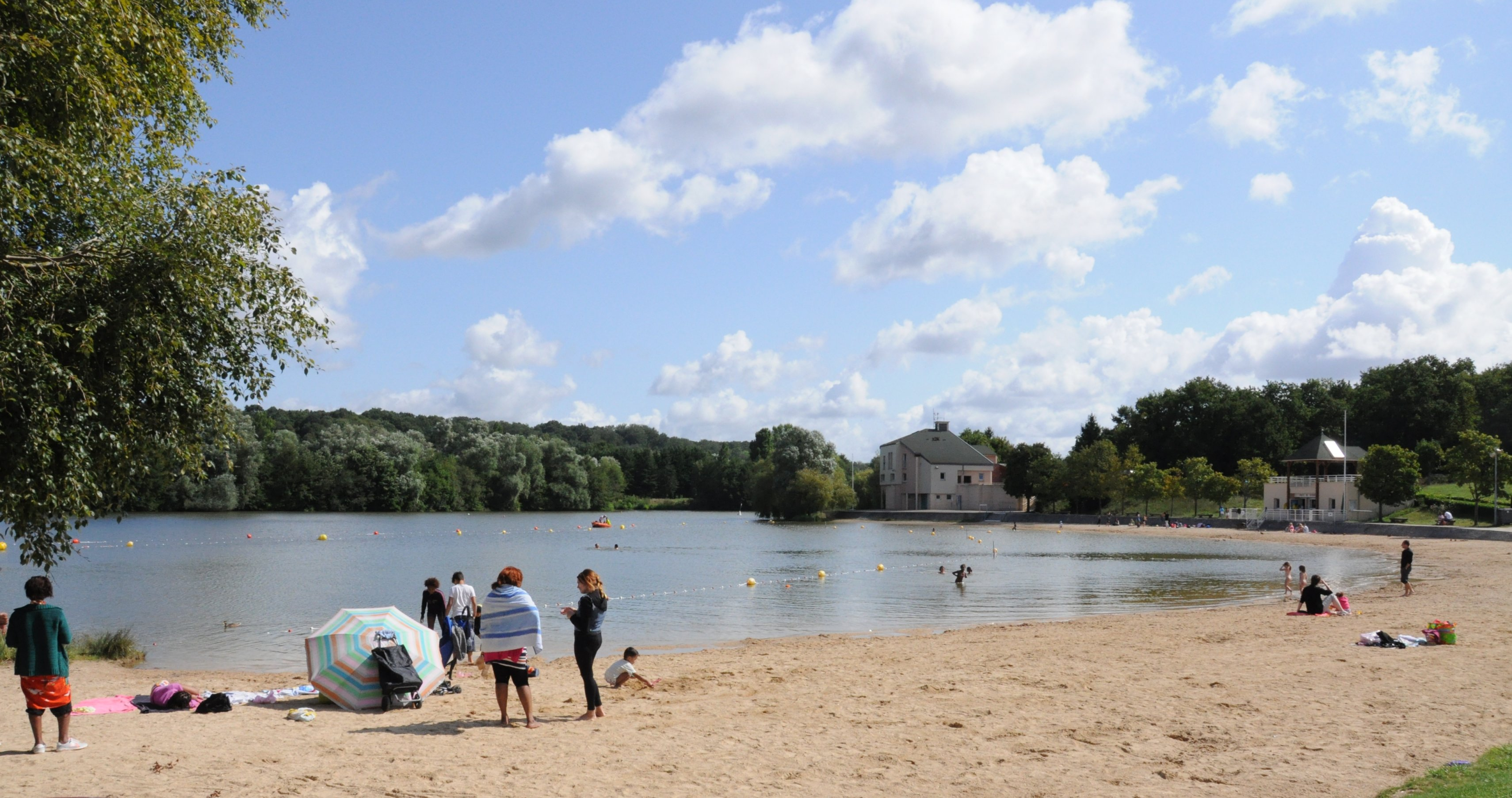 Base de loisirs de Bois-le-Roi (Seine-et-Marne)